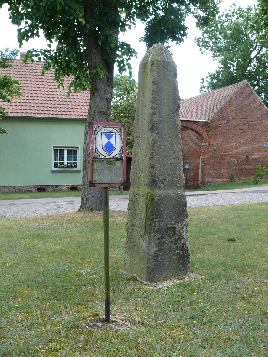 Ganzmeilenobelisk, Typ preußisch. 2001 unsachgemäß gesäubert; mit daneben stehenden Denkmalsschild mit Aufschrift "Preußischer Meilenstein Errichtet um 1800 von der alten Poststraße Magdeburg-Stendal"; siehe Berthold Schulze "Die Poststraßen in Brandenburg 1815"